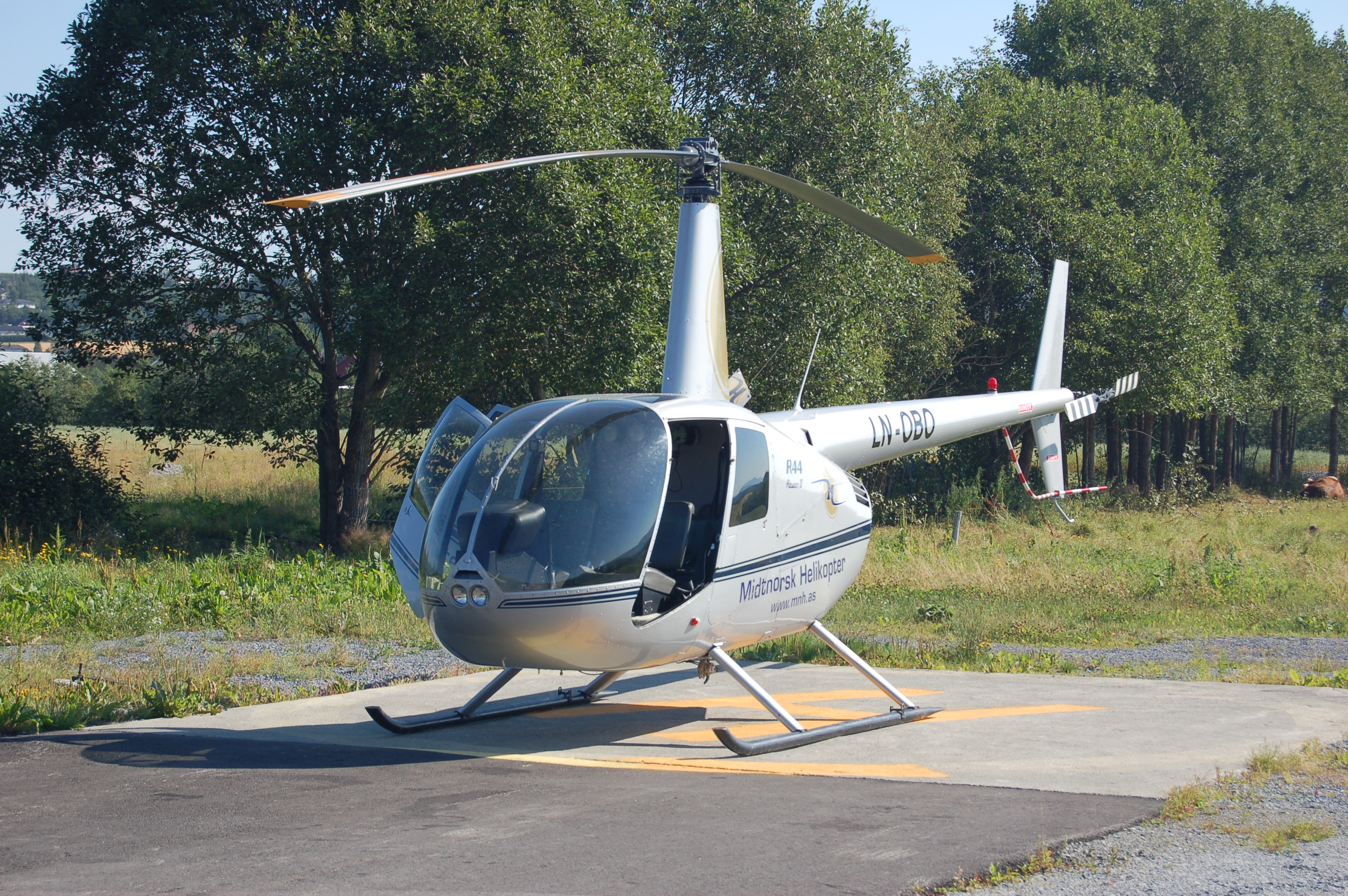 MidtNorsk Helikopter LN-OBO Robinson R44 helicopter at Verdal